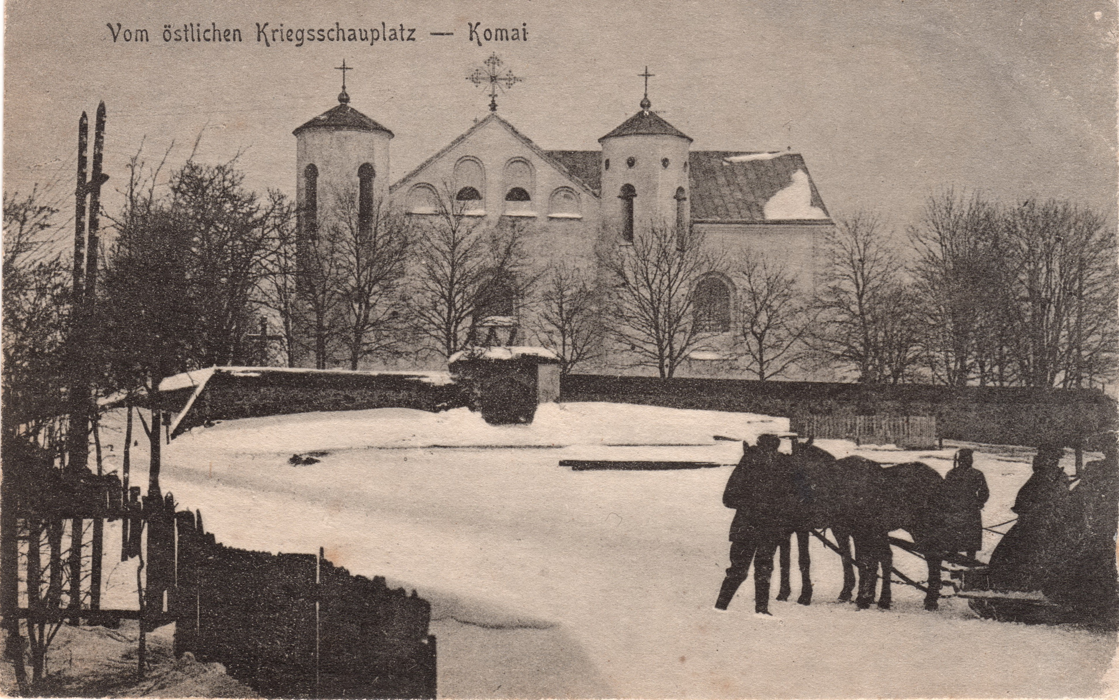 Беларуская (тарашкевіца): Камаі (Kamaji), пляц Рынак (plac Rynak). Касьцёл Сьвятога Яна Хрысьціцеля